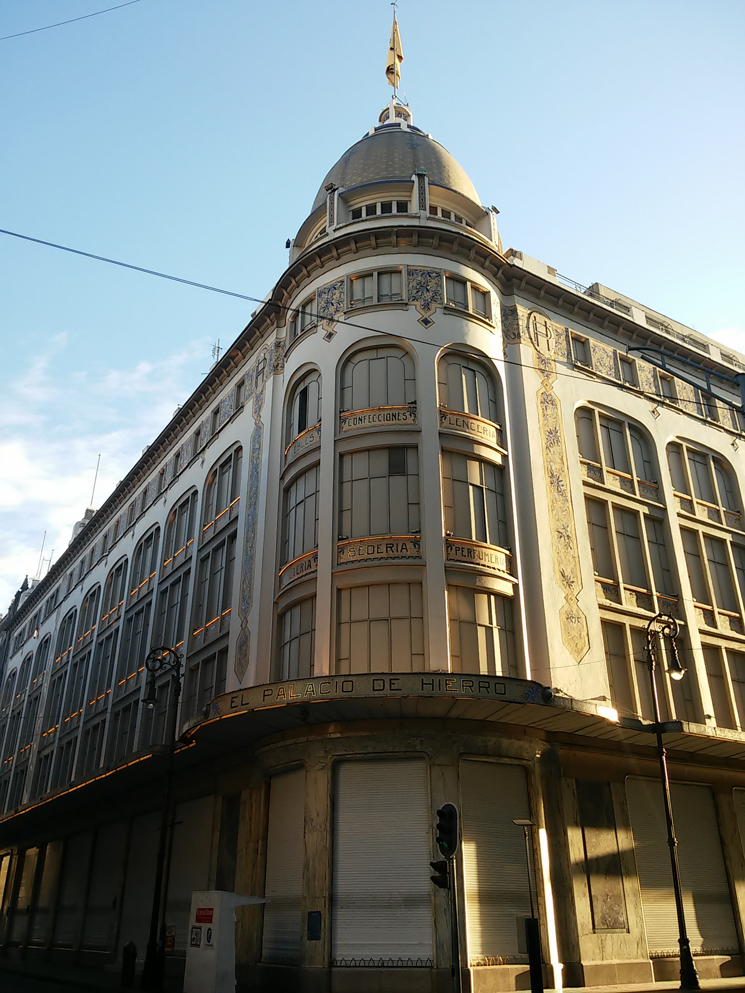 Edificio del palacio de hierro en el centro histórico de la Ciudad de México